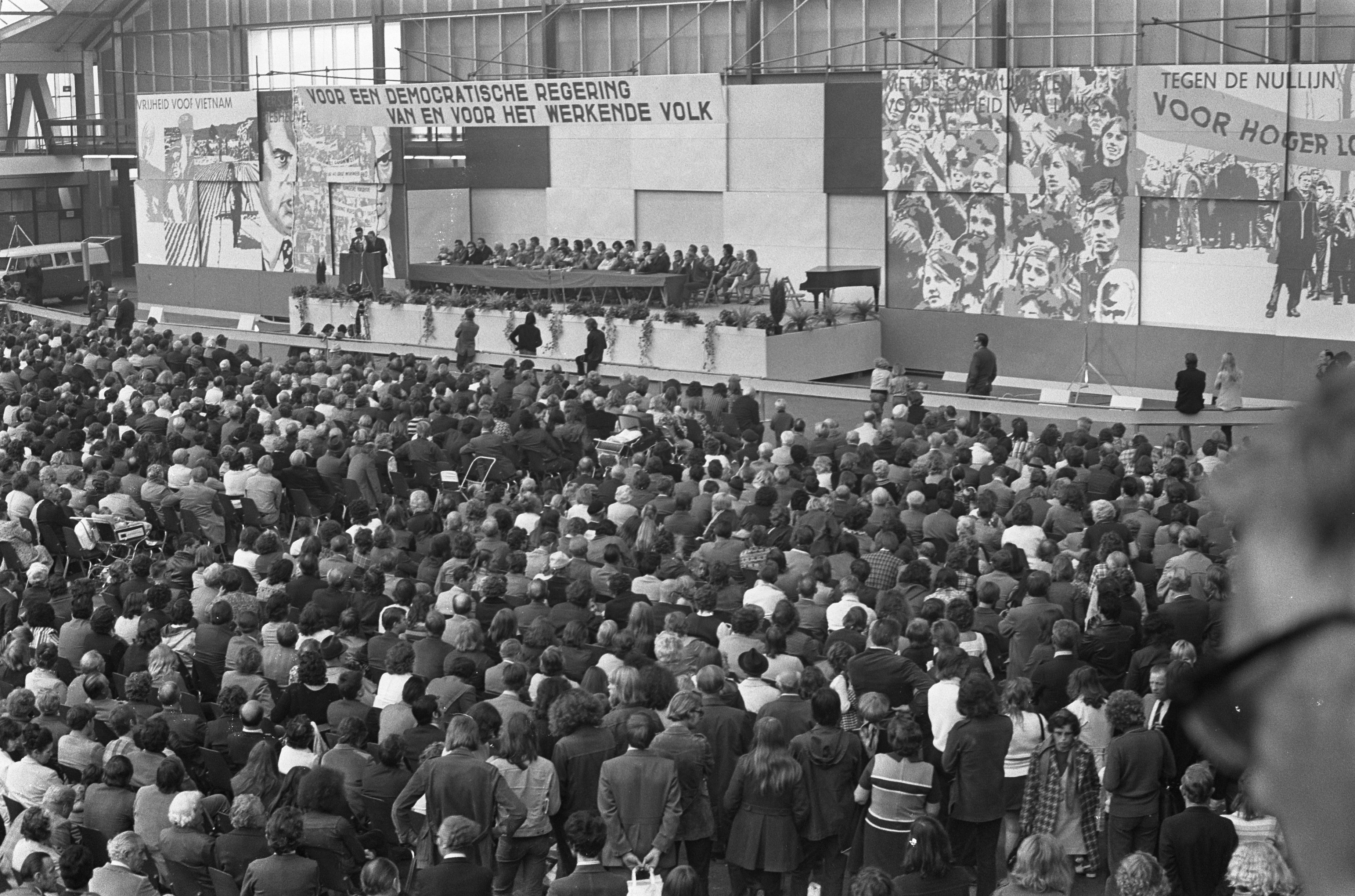 Collectie / Archief : Fotocollectie Anefo Reportage / Serie : [ onbekend ] Beschrijving : Waarheidsfestival in RAI te Amsterdam, overzicht Datum : 30 september 1972 Locatie : Amsterdam, Noord-Holland Trefwoorden : festivals Instellingsnaam : Waarheidsfestival Fotograaf : Croes, Rob C. / Anefo Auteursrechthebbende : Nationaal Archief Materiaalsoort : Negatief (zwart/wit) Nummer archiefinventaris : bekijk toegang 2.24.01.05 Bestanddeelnummer : 925-9203